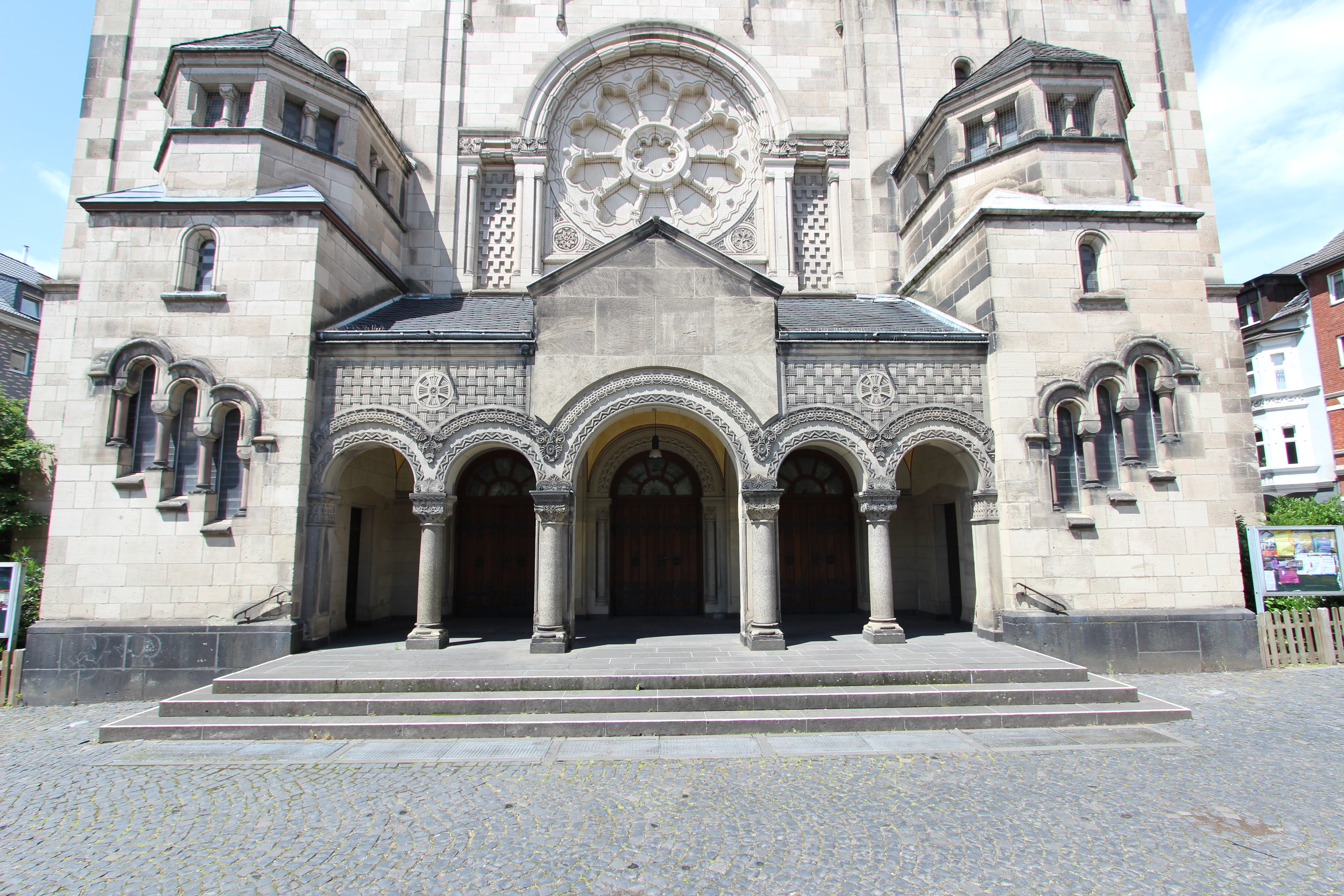 "Rather Dom" in 40472 Düsseldorf-Rath. Katholische Kirche St. Josef. Aufnahme aus Süd-Osten von 2016.